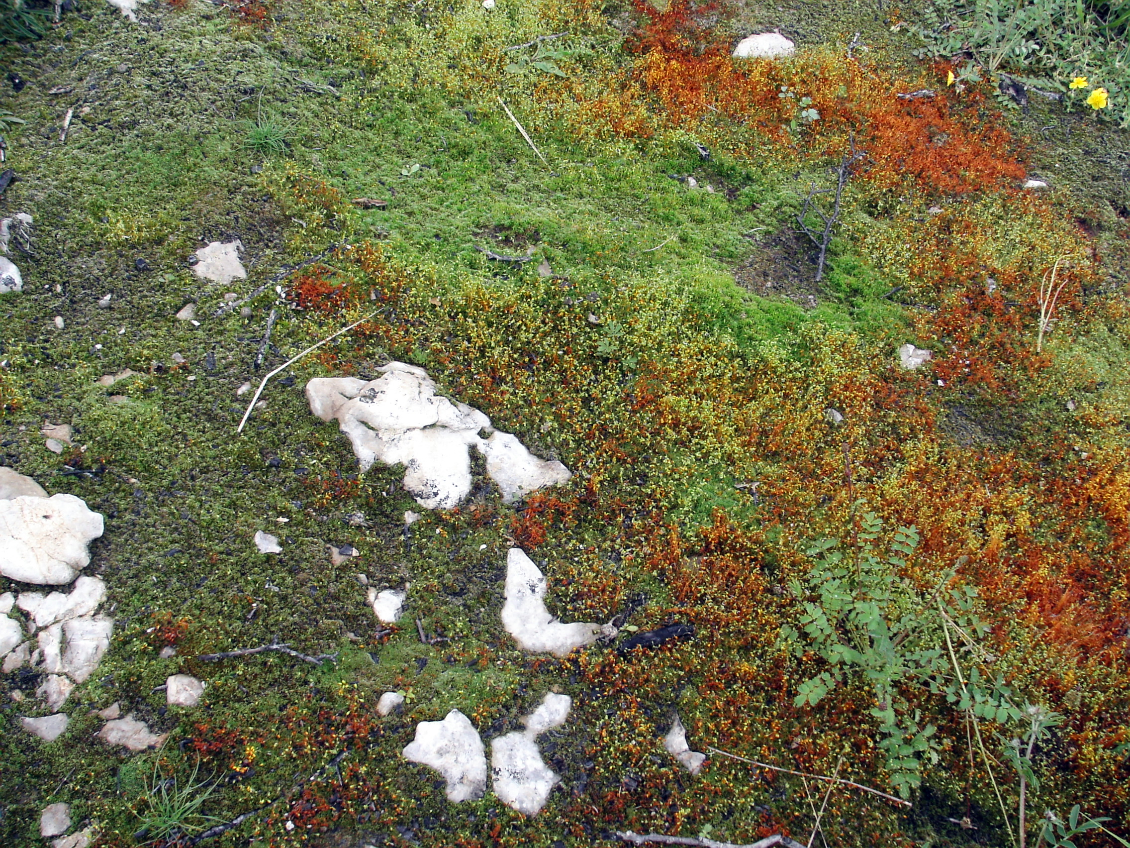 Mosses, Tienne Breumont, Nismes (Belgium)